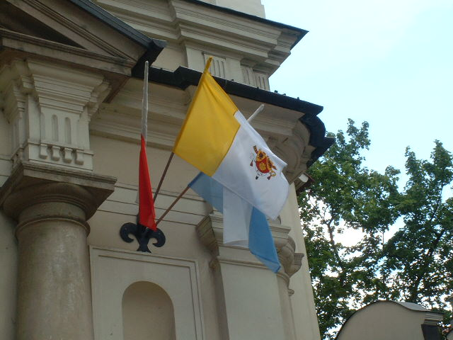 Description Standaard van paus Benedictus XVI tussen de vlag van Polen en de vlag van Krakau aan de muur van de Sint Florianskerk in Kraków. Date8 juni 2006, geupload op 9 juni 2006SourceOwn workAuthorZelf gemaakt door Ninane (overleg) op 8 juni 2006Permission (Reusing this file) Eigen werk Standaard van paus Benedictus XVI tussen de vlag van Polen en de vlag van Krakau aan de muur van de Sint Florianskerk in Kraków.